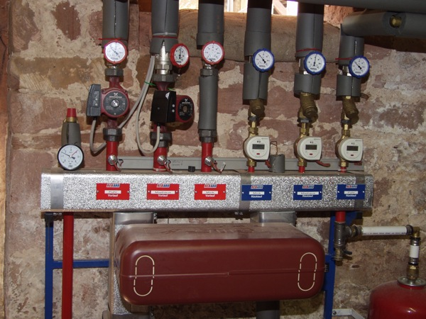 Hausverteiler eines örtlichen Nahwärmenetzes